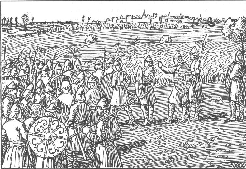 Wilhelm Wetlesen: Illustration for Harald Hardrådes saga, Heimskringla 1899-edition. nn: «Kong Harald let hæren stane.»